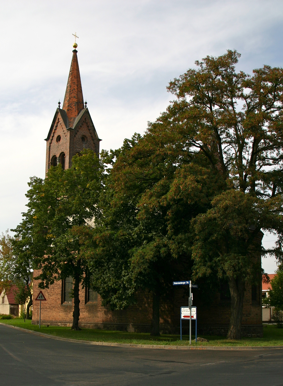 Elsnigk ist einOrtsteil der Gemeinde Osternienburger Land im Landkreis Anhalt-Bitterfeld in Sachsen-Anhalt.